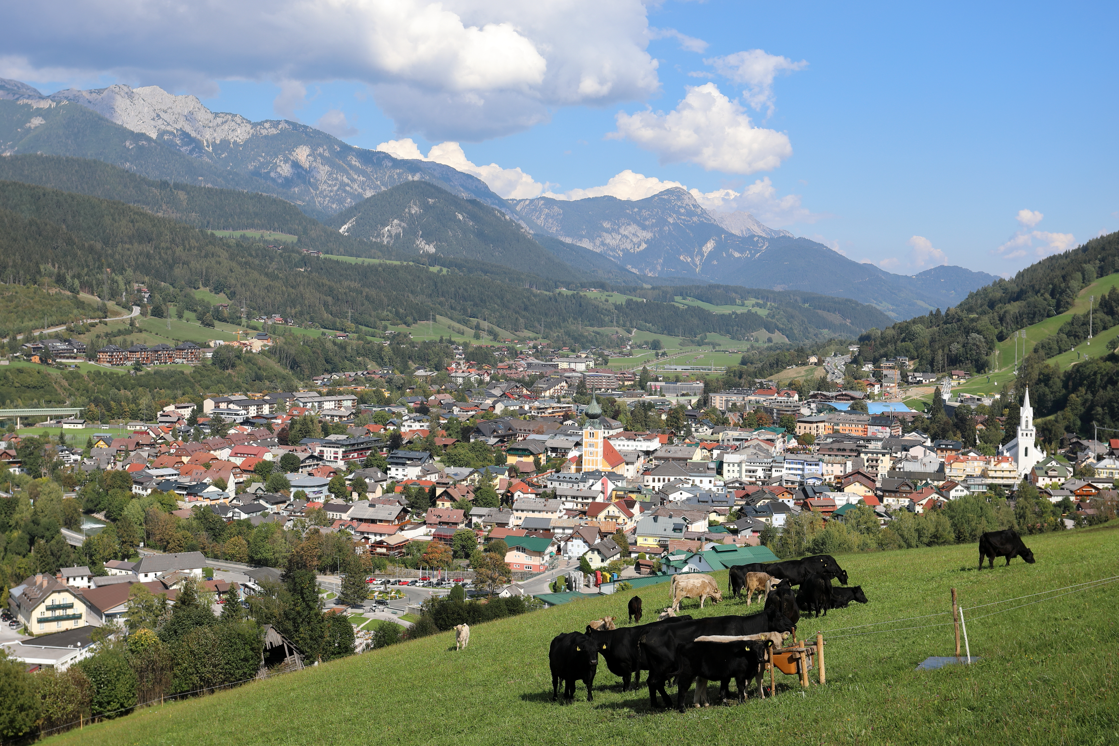 Südwestansicht der österreichischen Stadtgemeinde Schladming in der Steiermark.